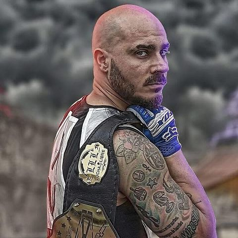 Enigma 17 en el 2017